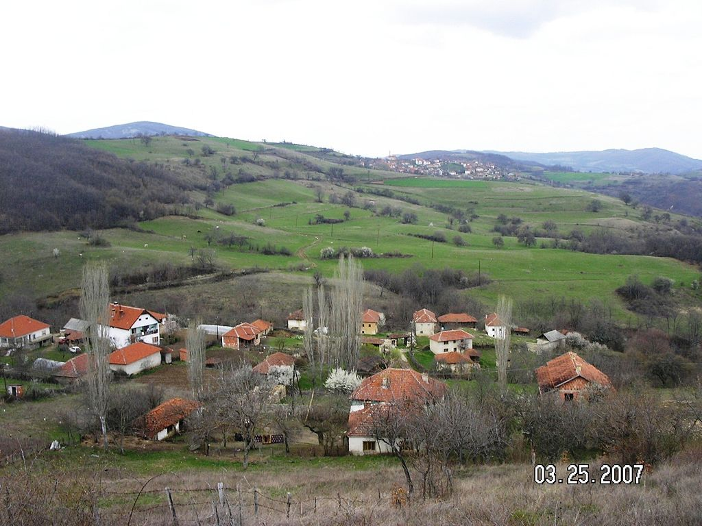 lagje, Kokaj